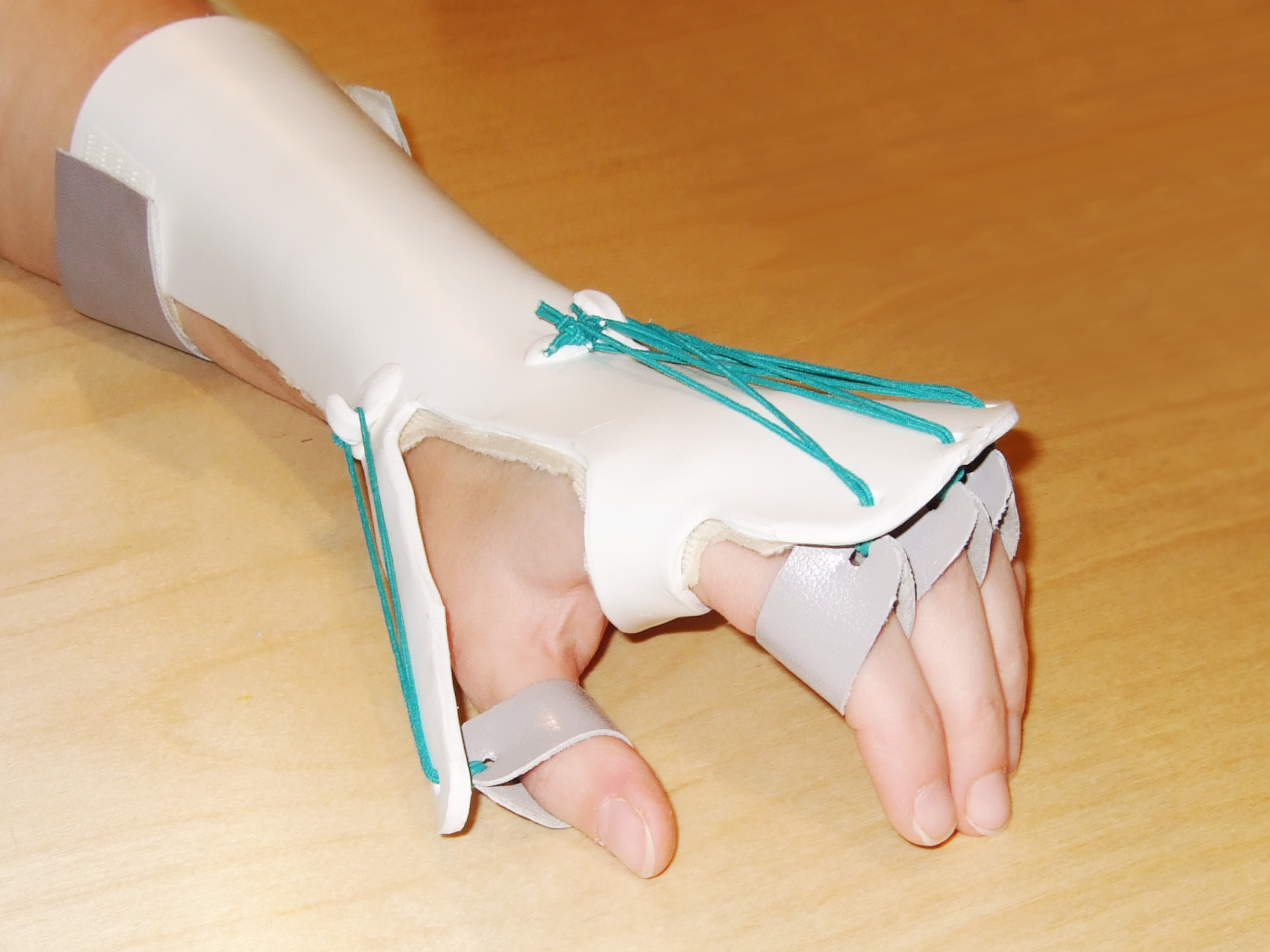 Funktionsschiene bei Verletzungen des Nervus radialis. Handgelenk und Finger werden gestreckt und das Greifen wird wieder ermöglicht.